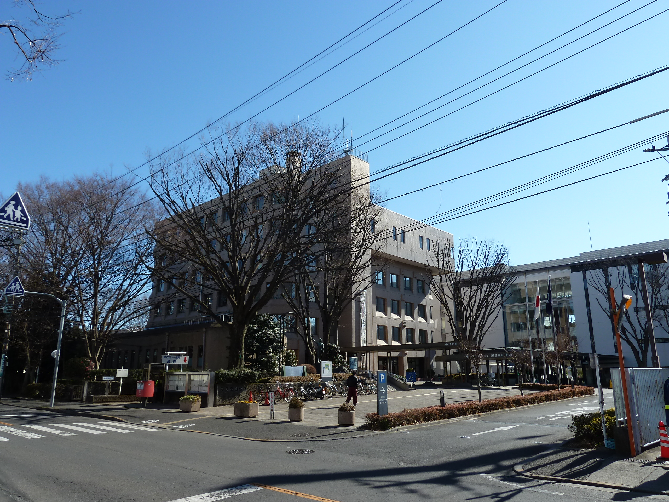 東村山市役所